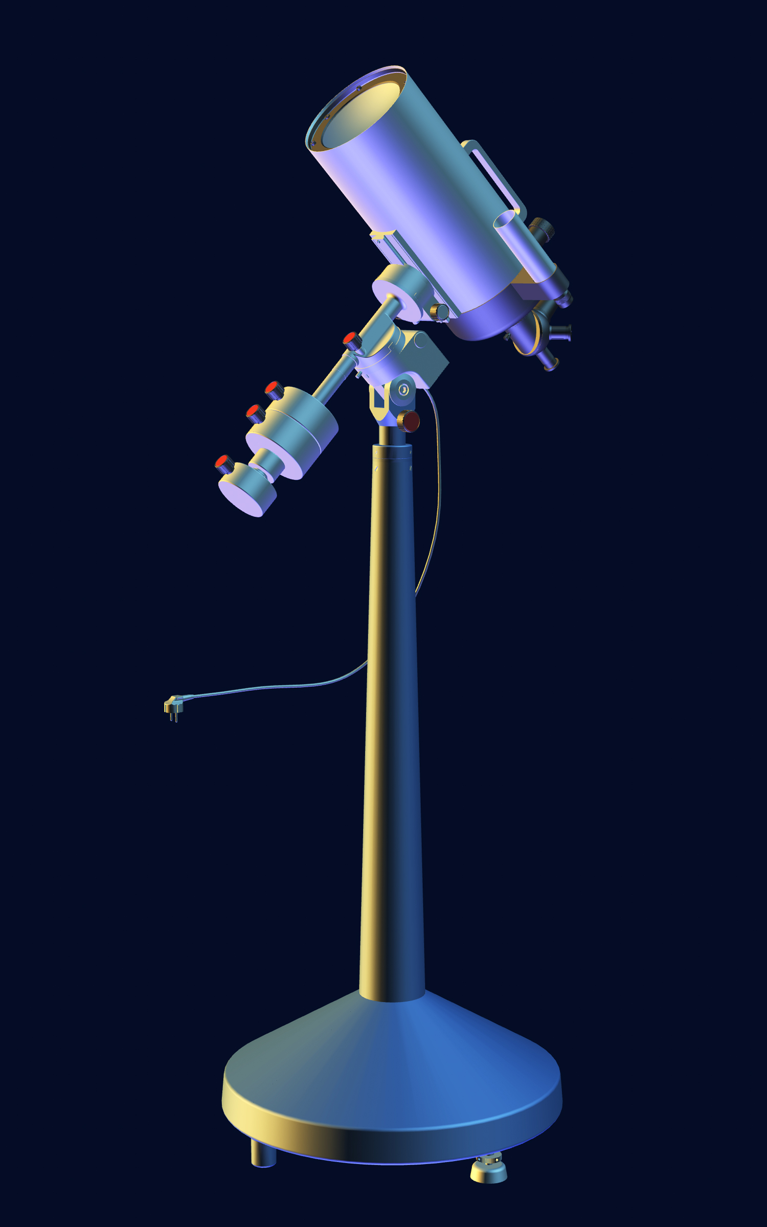 Beschreibung: Maksutov-Teleskop MENISCAS 180, CAD-Modell mit ViaCAD modelliert und Adobe Acrobat 9 bearbeitet. Datum: 22. November 2008 gestaltet von: ArtMechanic Andere Version: 3D-PDF (nur mit aktueller Version des Adobe Readers lesbar): Image:MENISCAS 180 CAD-Modell.pdf